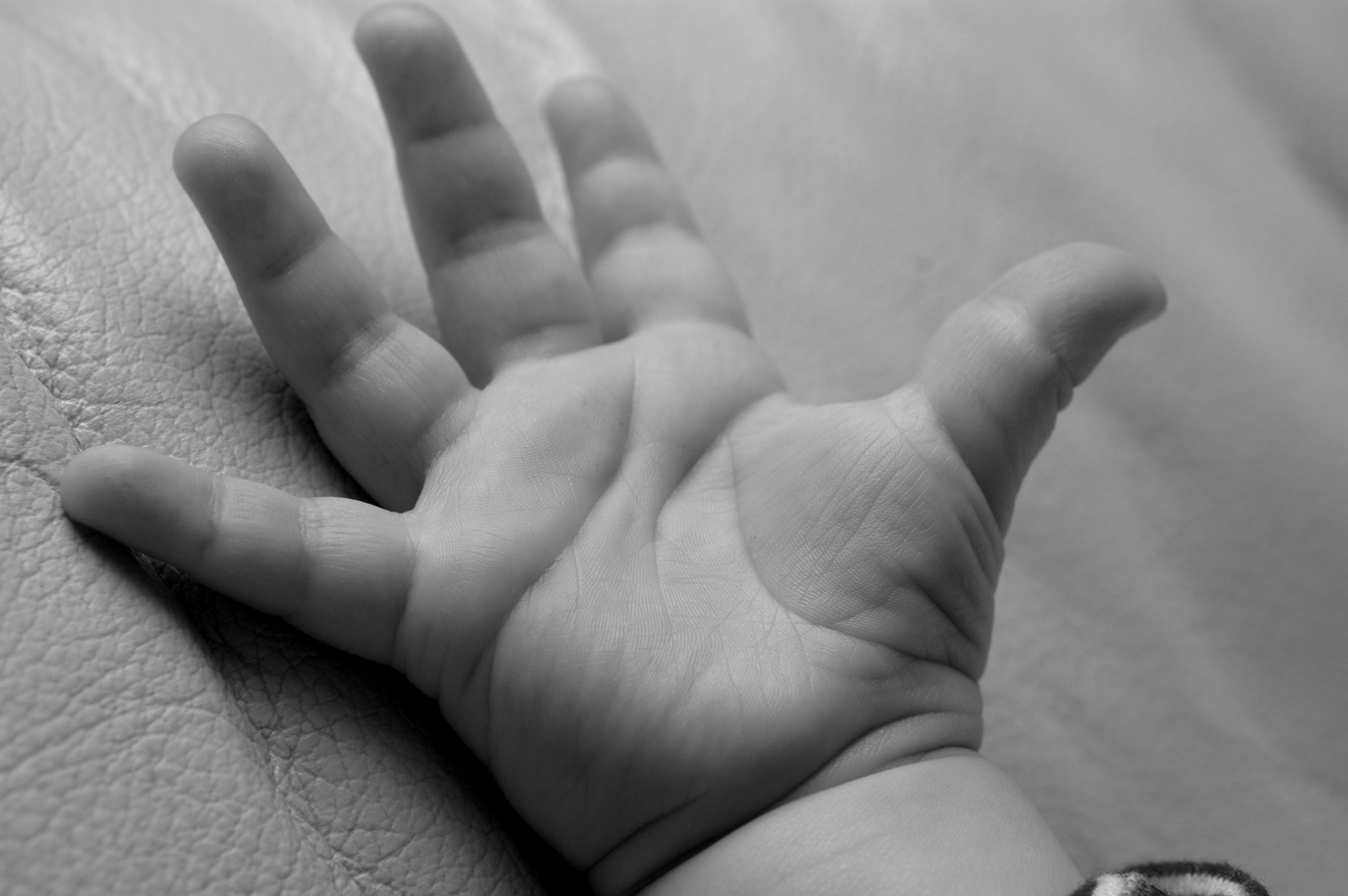 Noah's hand